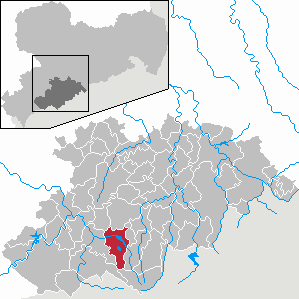 Raschau-Markersbach im Erzgebirgskreis, Sachsen